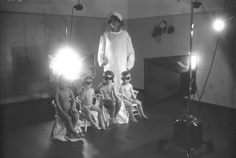 Grosstadtkinder unter der heilenden Höhensonne! In Berlin Wedding befindet sich ein städtisches Höhensonnen-Institut zur Bestrahlung bedürftiger Grosstadtkinder. Mit Schutzbrillen vor den Augen werden die Grosstadtkinder den heilenden Strahlen der Höhensonne ausgesetzt.